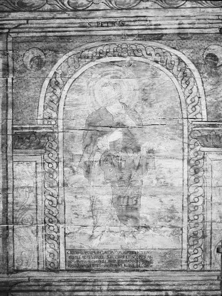 Målning i sakristian, 1700-talets början. Efter renovering 1956. Kategori: (03) Målningar på träMålning i sakristian, 1700-talets början. Efter renovering 1956.